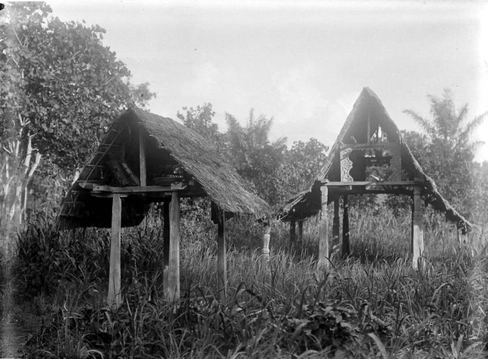 Negatief. Twee kleine constructies op palen, waarvan één een dorpstempel, Galela, Halmahera